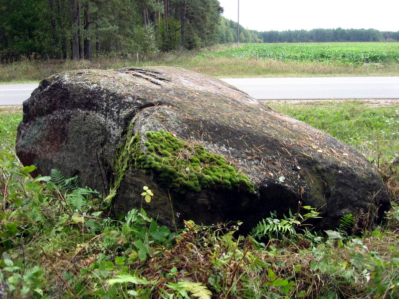 Камень дайнаўскі. Дайнава